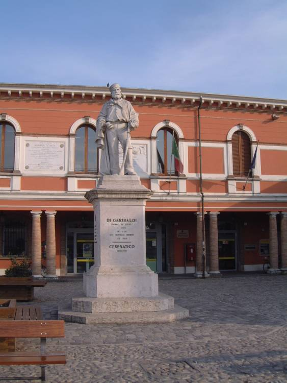 Je suis l'auteur de cette photo réalisée à Cesenatico en avril 2007